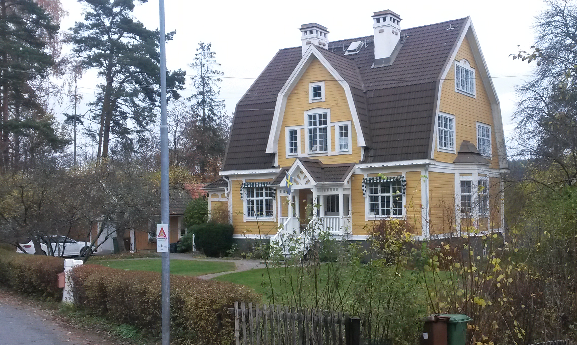 Brunkebergsåsen 44, Norrvikens Villastad